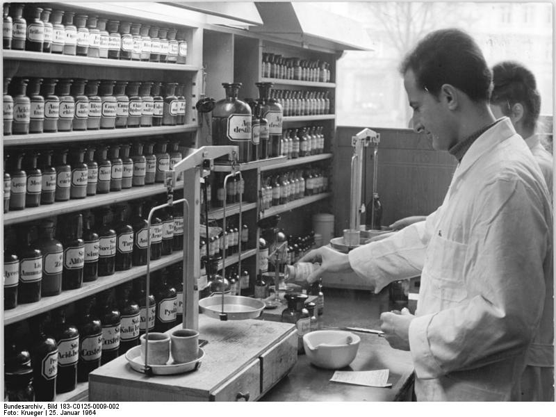 Apotheker Medizin herstellend Zentralbild Krueger 25.1.1964 In der Rezeptur der Apotheken - hier in der Apotheke "Berliner Bär" in der Karl-Marx-Allee Berlin - werden die Arzneimittel nach ärztlichem Rezept zusammengestellt. Azmi Dronbi, cand. der Pharmazie, der in dieser Apotheke sein Praktikum absolviert, wägt Arzneistoffe ab.